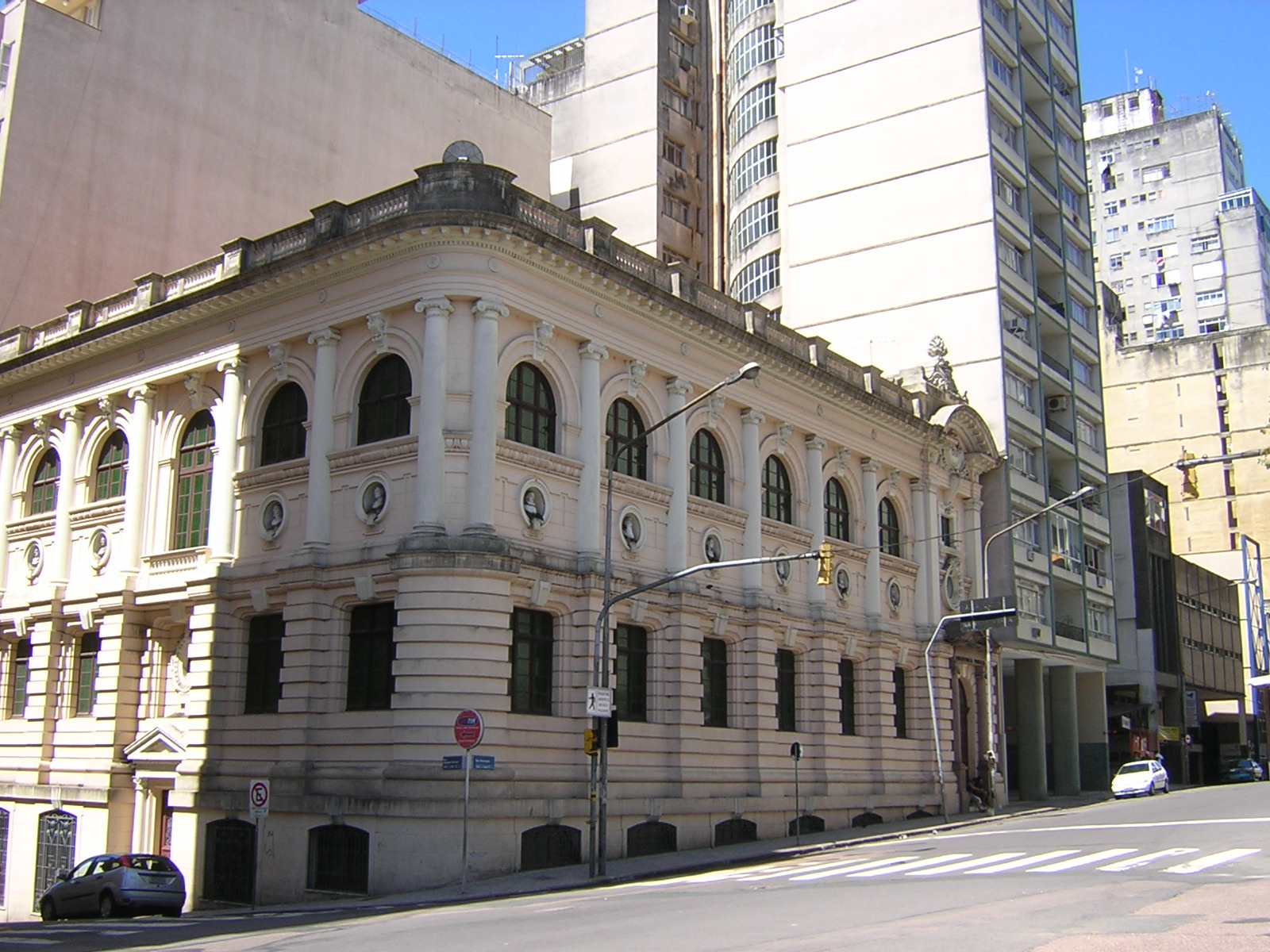 Biblioteca Pública do Estado